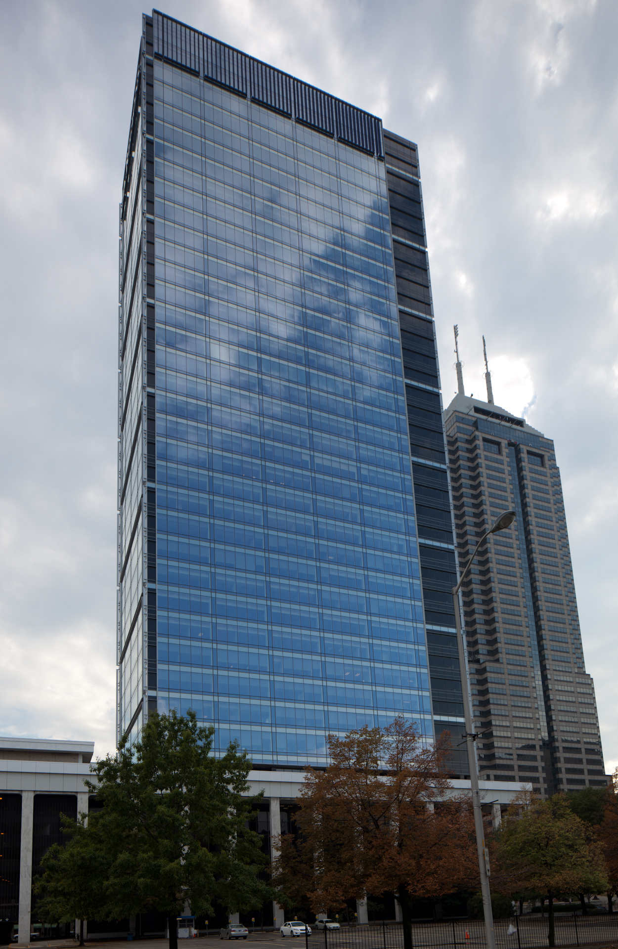 Indianapolis, Indiana, USA.